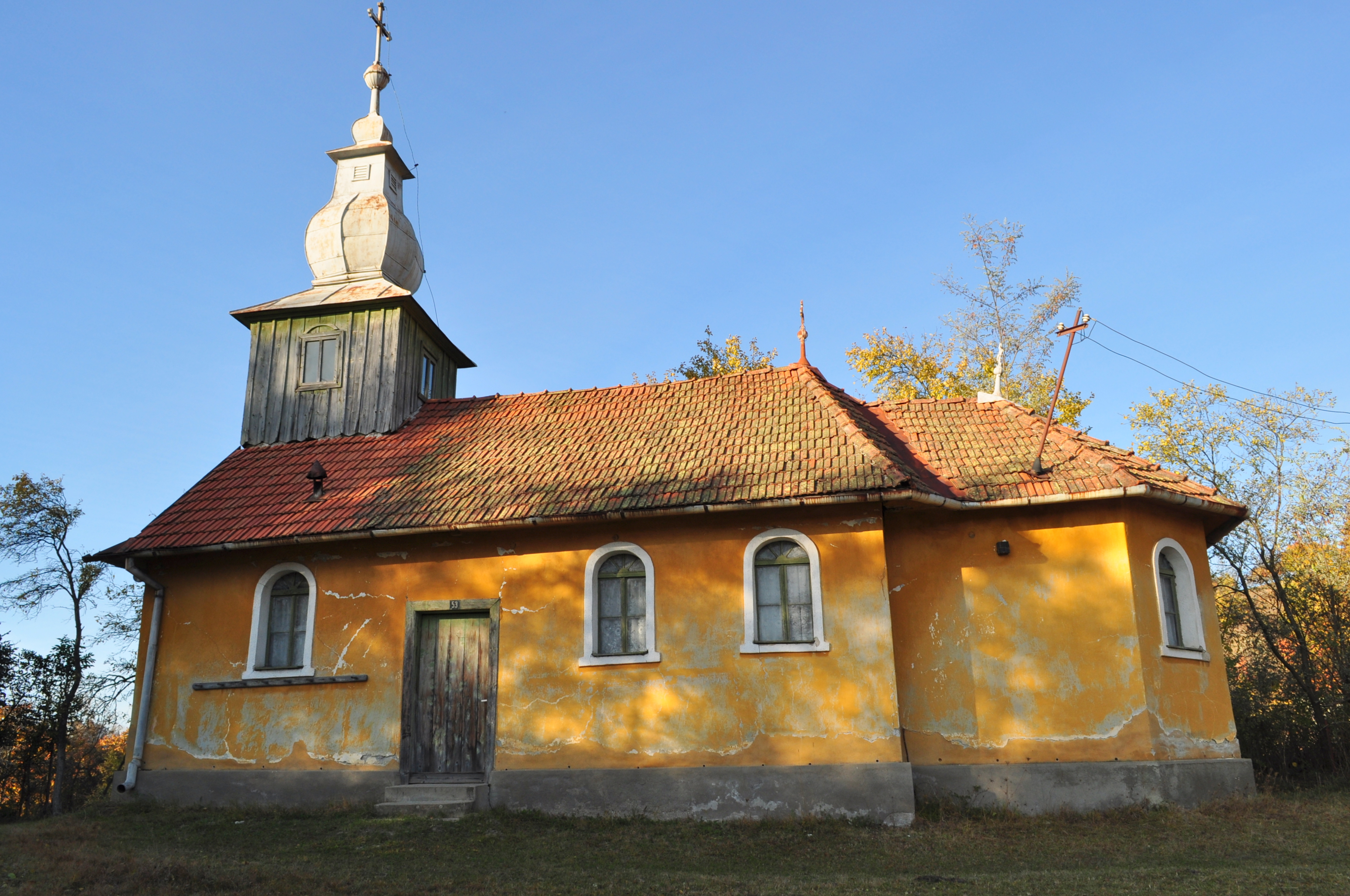 Biserica de lemn "Înălţarea Domnului" din Groși, județul Arad